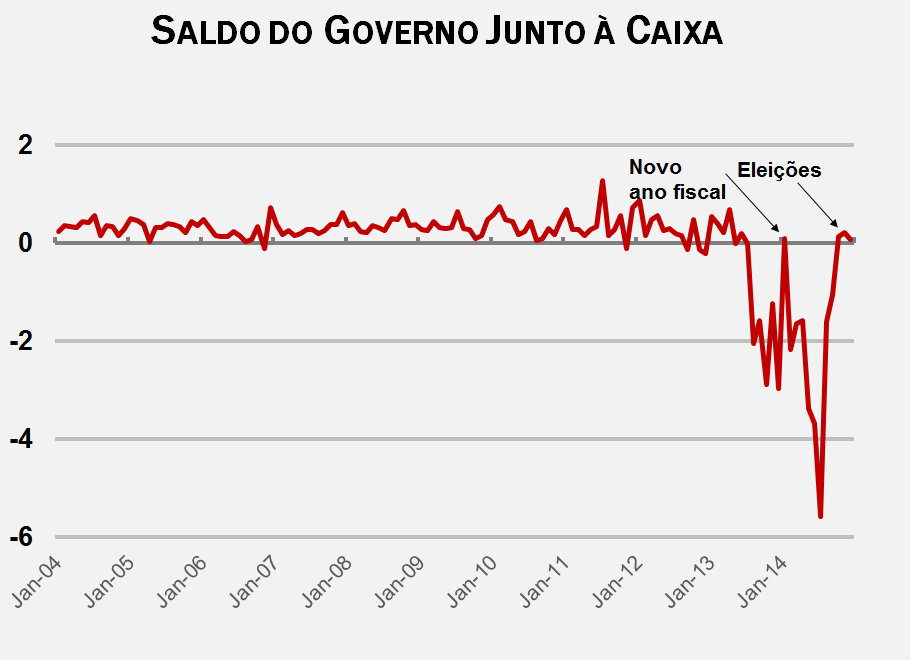 Gráfico indicando o saldo do governo federal do Brasil junto à Caixa Econômica Federal, indicando, desta forma, as pedadas fiscais.